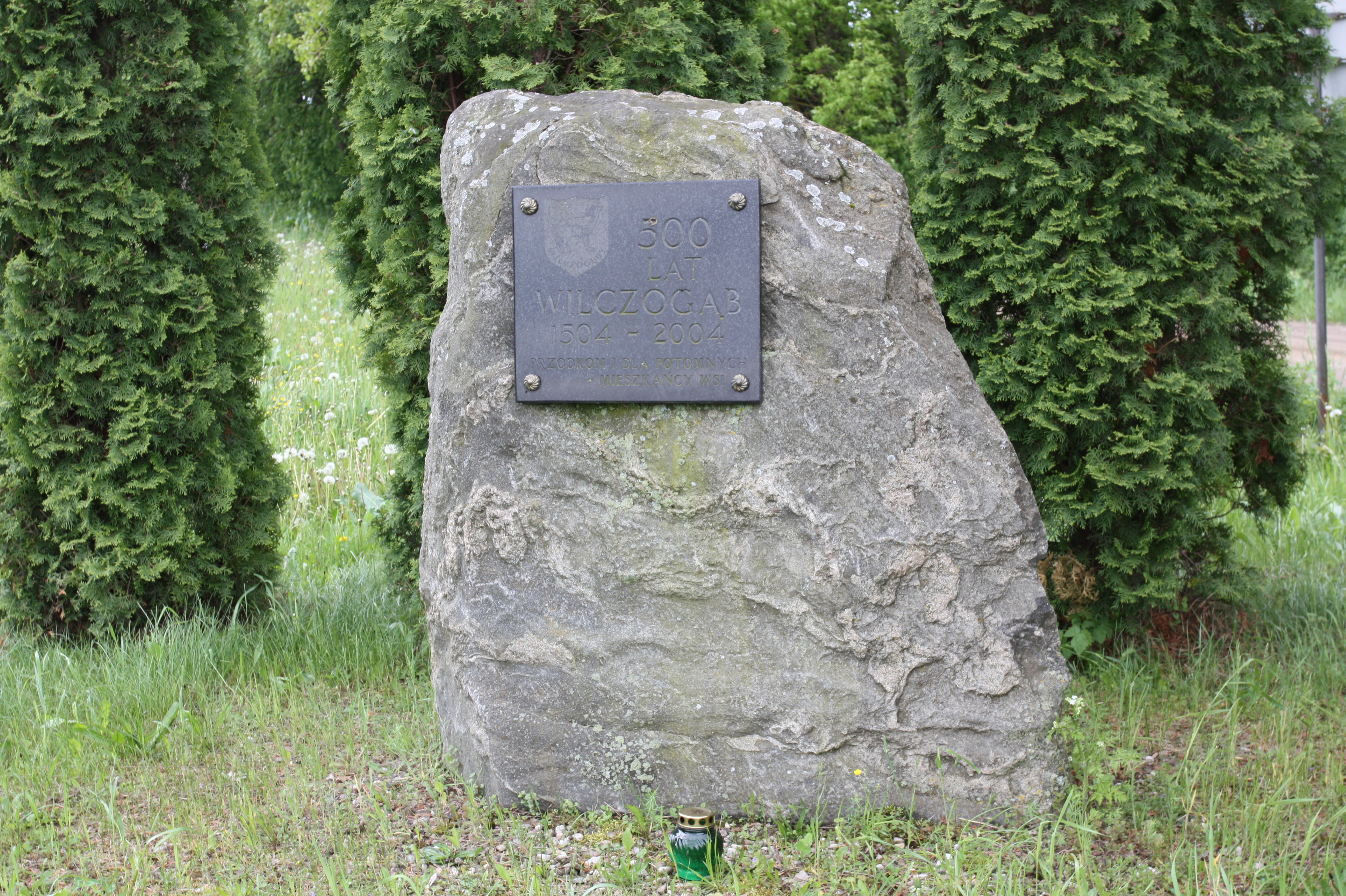 Tablica upamiętniająca 500 lat wsi Wilczogęby na przydrożnym kamieniu